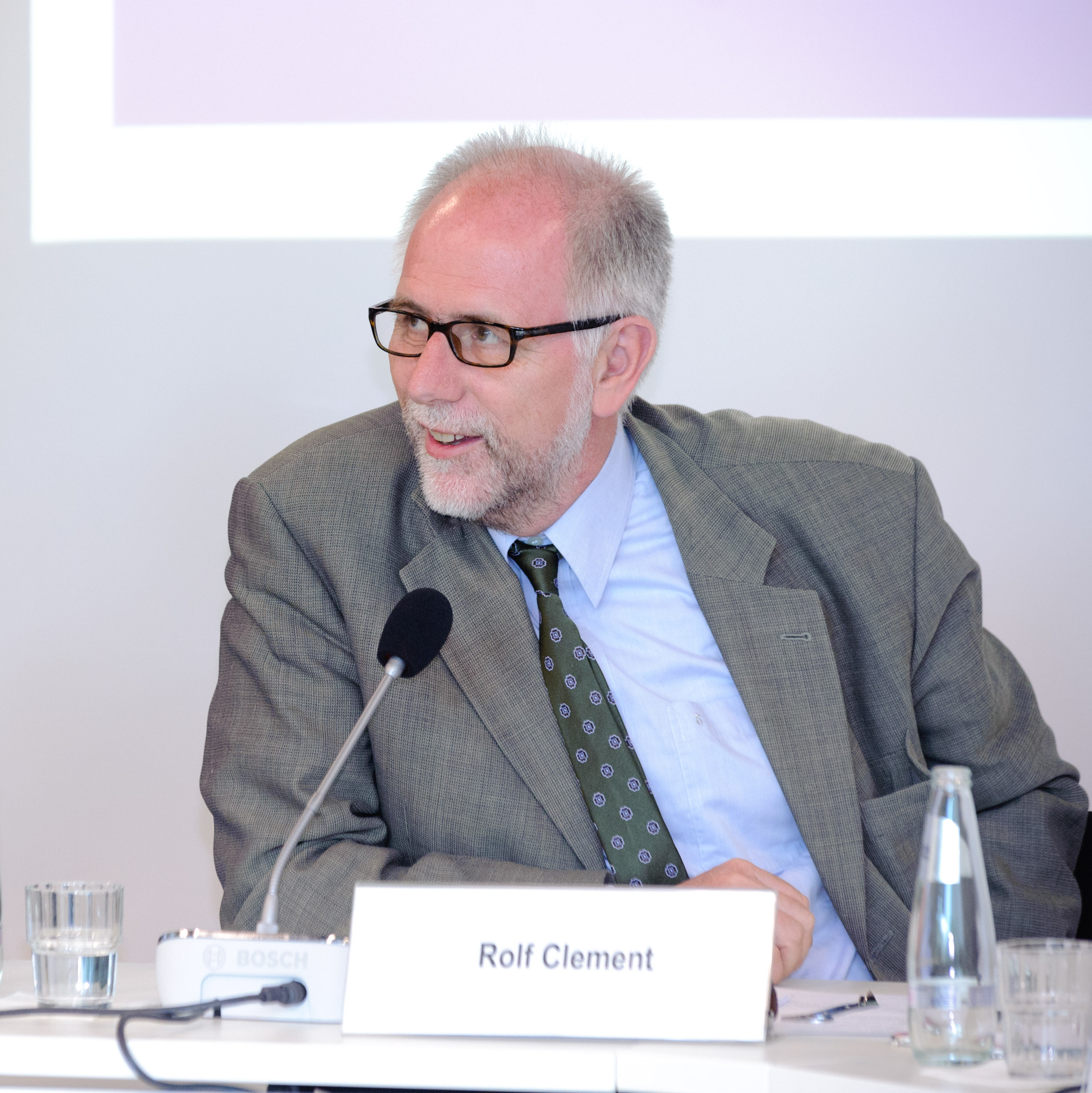 Rolf Clement (Korrespondent f. Sicherheitspolitik, Deutschlandfunk, Köln) Heinrich-Böll-Stiftung, Konferenz: Außenpolitische Jahrestagung 2011 Foto: Stephan Röhl